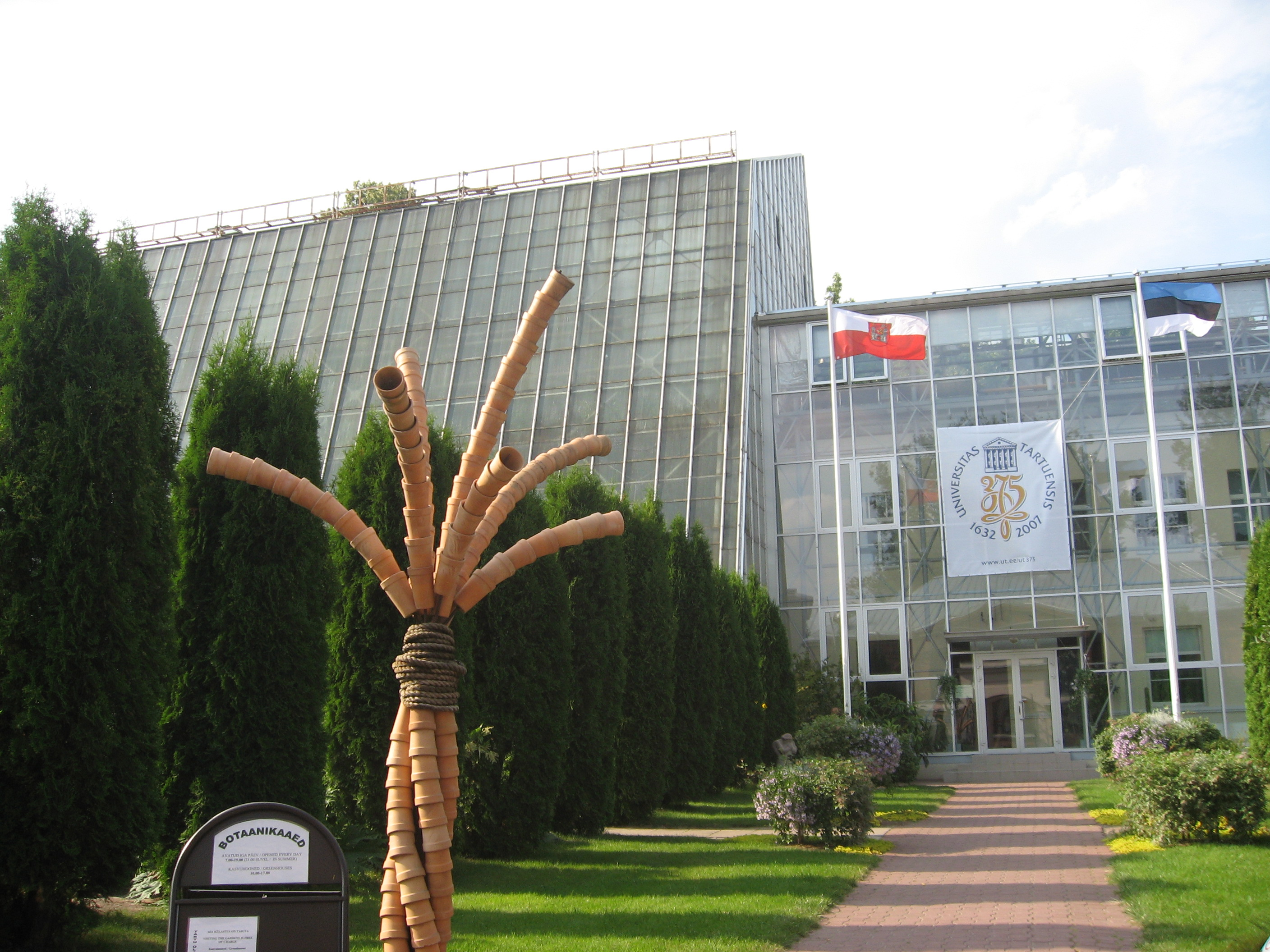 Tartu, botanická zahrada